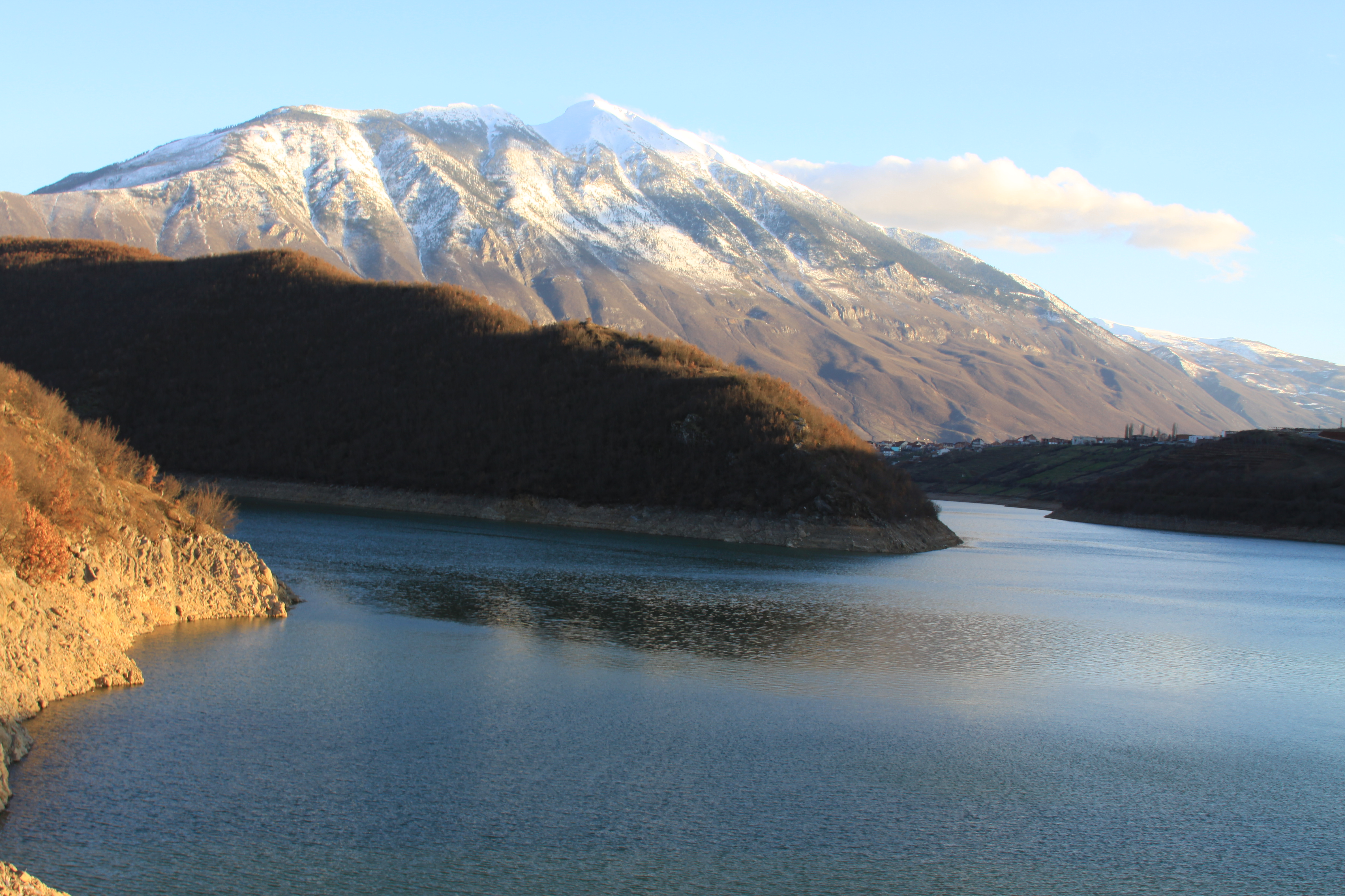 Kodra e Peces nga Kulla e Lumes,Kukes